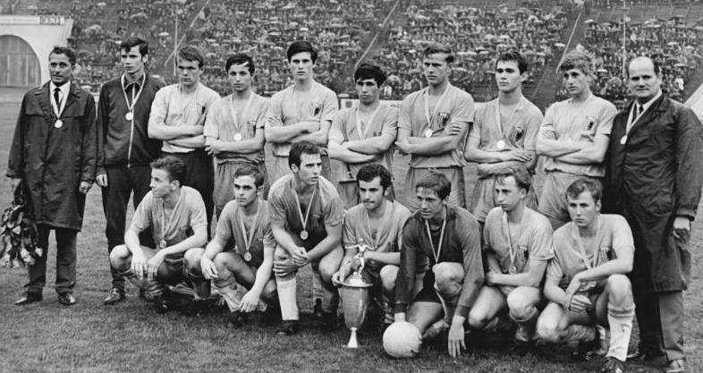 Zentralbild-Kluge Ma. 25.4.1968 Leipzig: Fußball - Junge-Welt-Pokal nach Karl-Marx-Stadt. Gewinner des 20. Junge-Welt-Pokal-Wettbewerbes der Fußball-Junioren wurde am 24.4.1968 im Leipziger Zentralstadion der FC Karl-Marx-Stadt (foto nach der feierlichen Siegerehrung) durch einen 3:1-Endspielerfolg über den BFC Dynamo, dem Pokalsieger von 1966 und 1967. Das finale wurde vor dem Olympia-Qualifikatinsspiel DDR-Bulgarien ausgetragen. Lnks Trainer Heinz Weber, rechts Mannschaftsleiter August Götte. Vordere Reihe Mitte Mannschaftskapitän Frank Wiedensee mit dem Pokal.